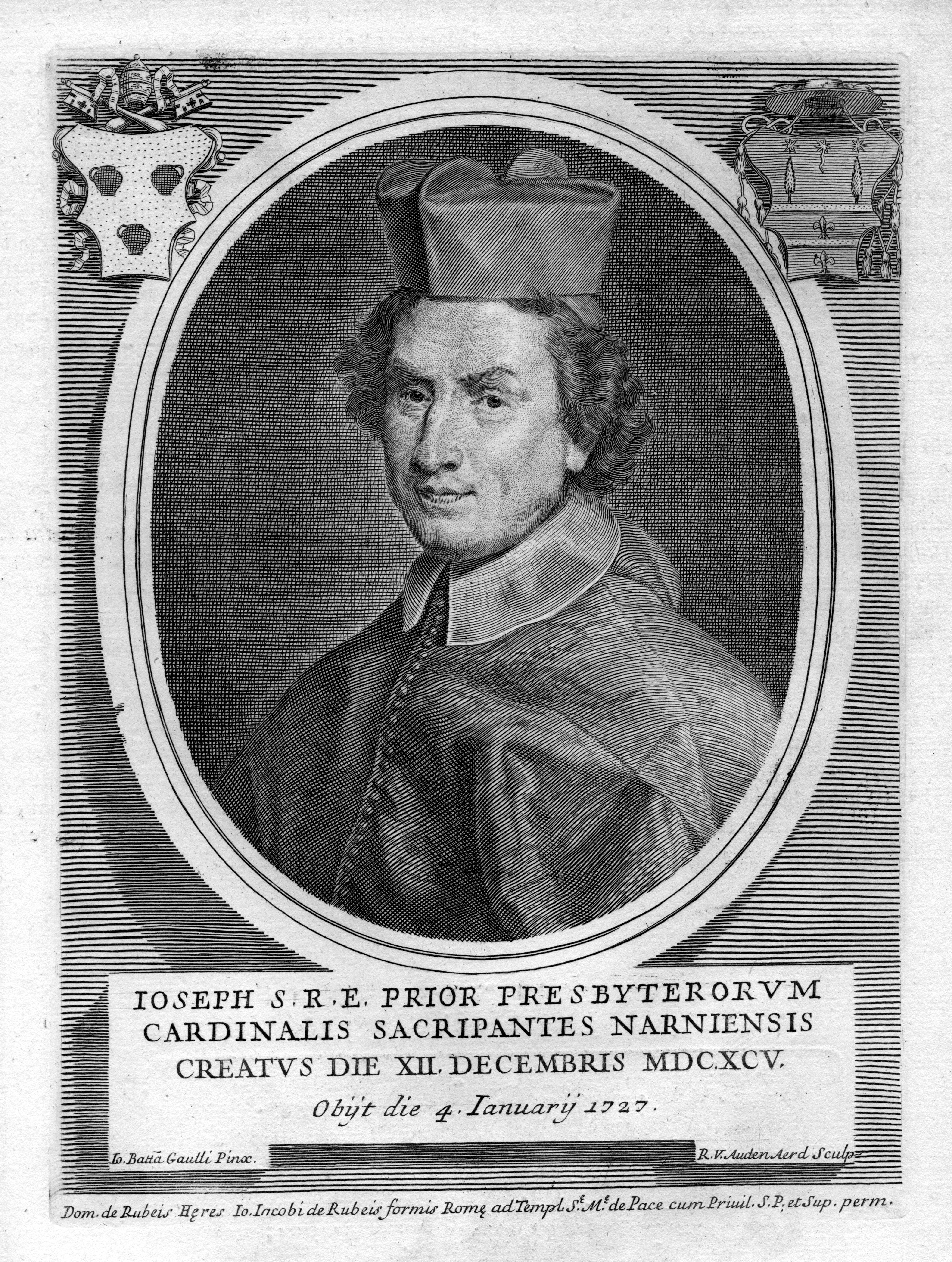 portrait gravé